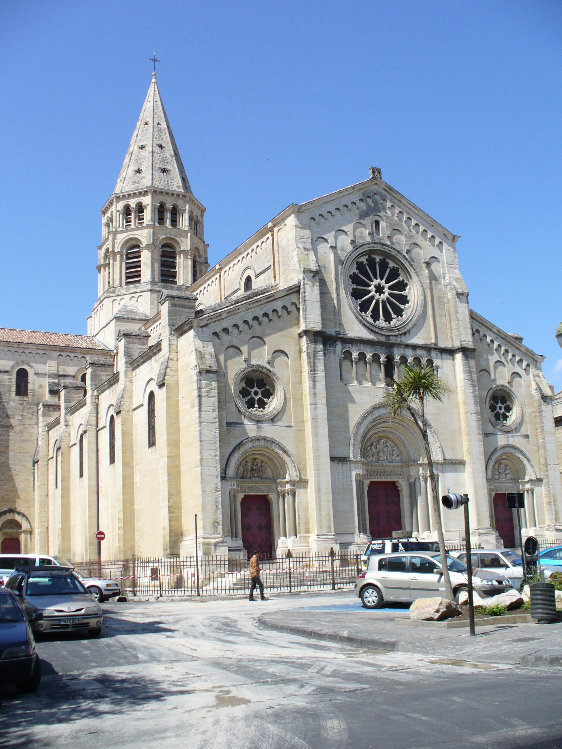 Nimes Kirche Eglise St.Paul